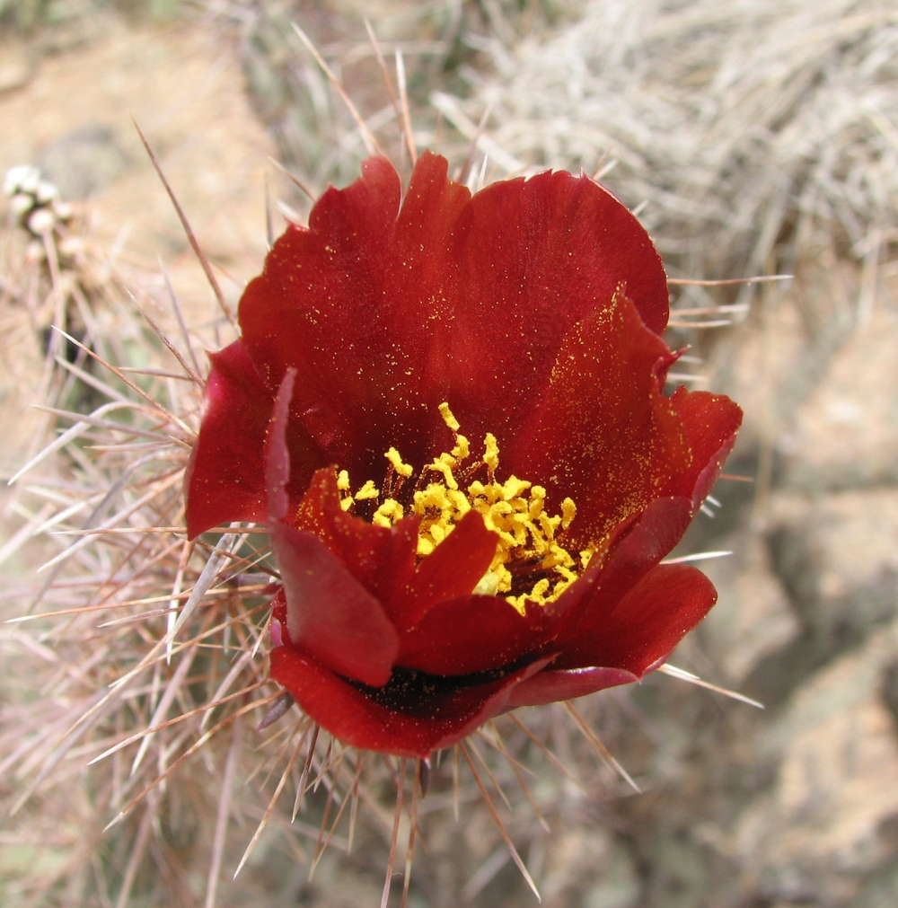 Opuntia acanthocarpa, Arizona-Sonora Desert Museum, Tucson, Arizona